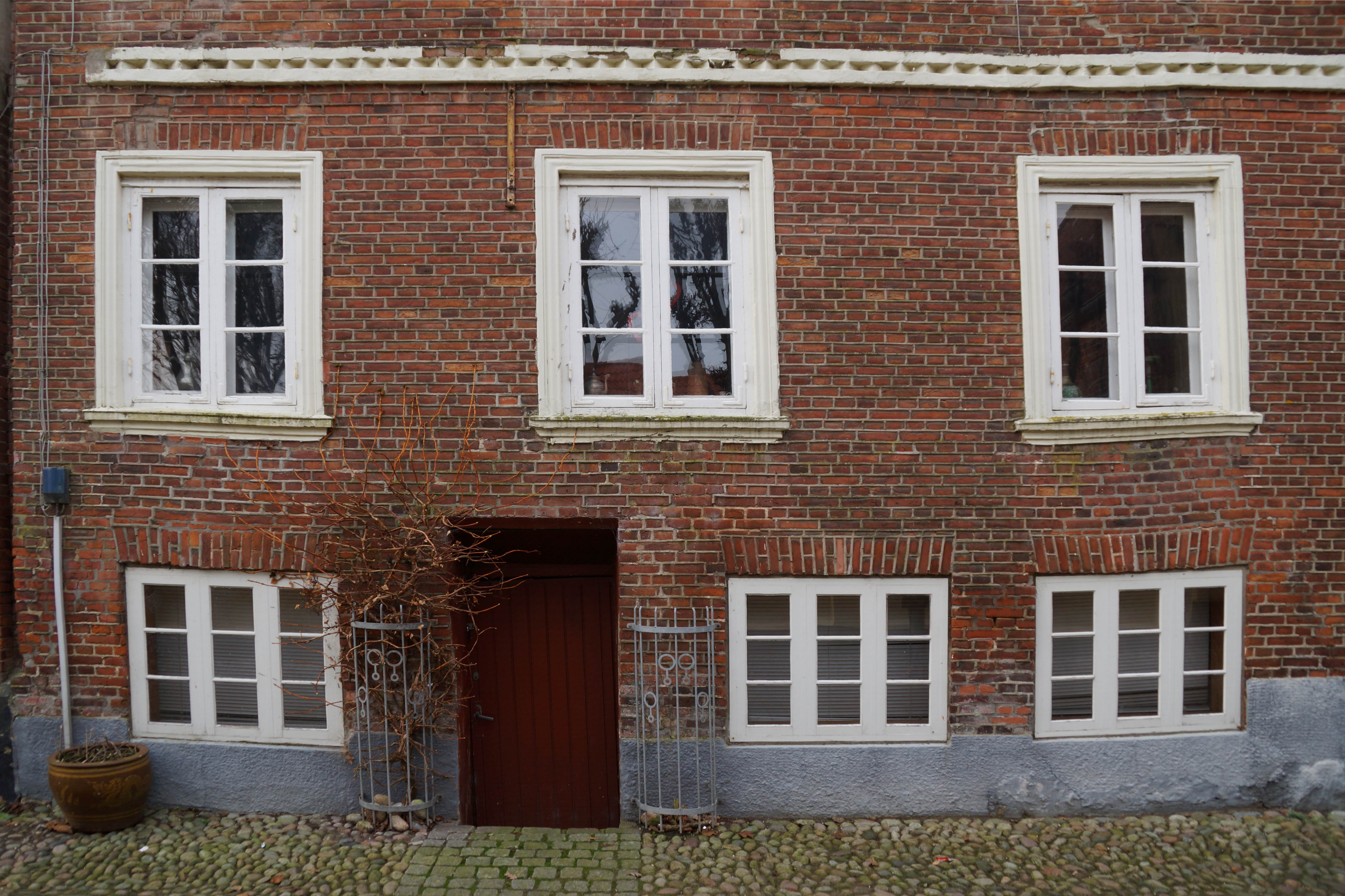 Bauwerkssetzungen an Mauerwerk und Fenstern in Tønder, Søndergade. Foto Wolfgang Pehlemann DSC00622.Nachtrag: Setzungen nicht nur bis zu den Fensterbänken, sondern auch bis zur Verschiebung der Fensterflügel z.B. oben rechts. Fotobearbeitung: nur stürzende Linien in Abweichung von der Vertikalen korrigiert.